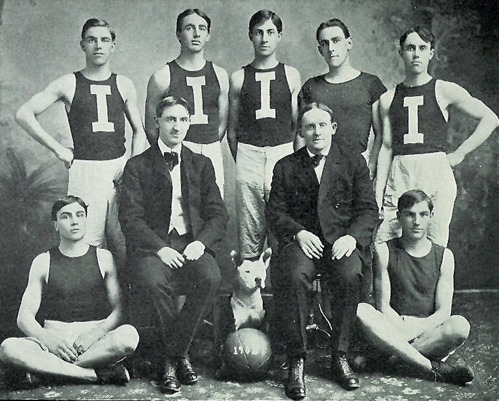 1905 Idaho Vandals (Idaho University, kosárlabda)